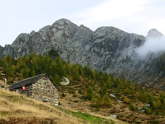 Alpe di Gesero, Ticino, Svizzera